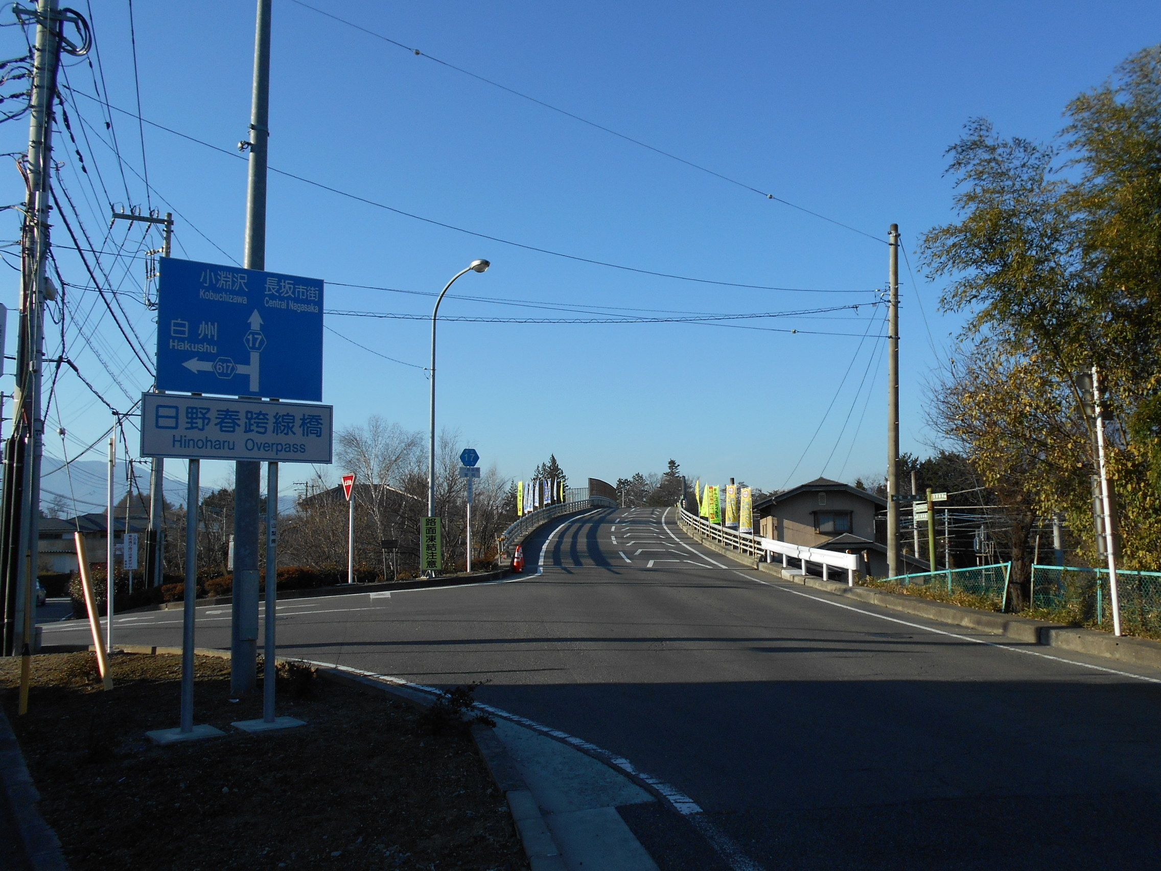 山梨県道17号茅野北杜韮崎線 日野春跨線橋